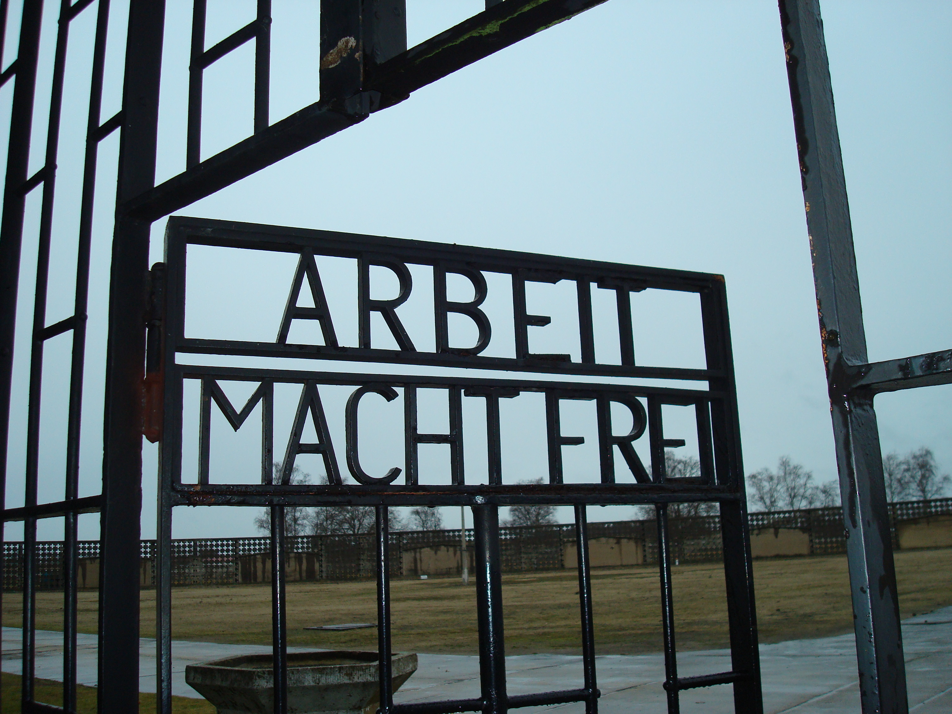 Sachsenhausen gate.